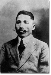 Kim Gu in 1919